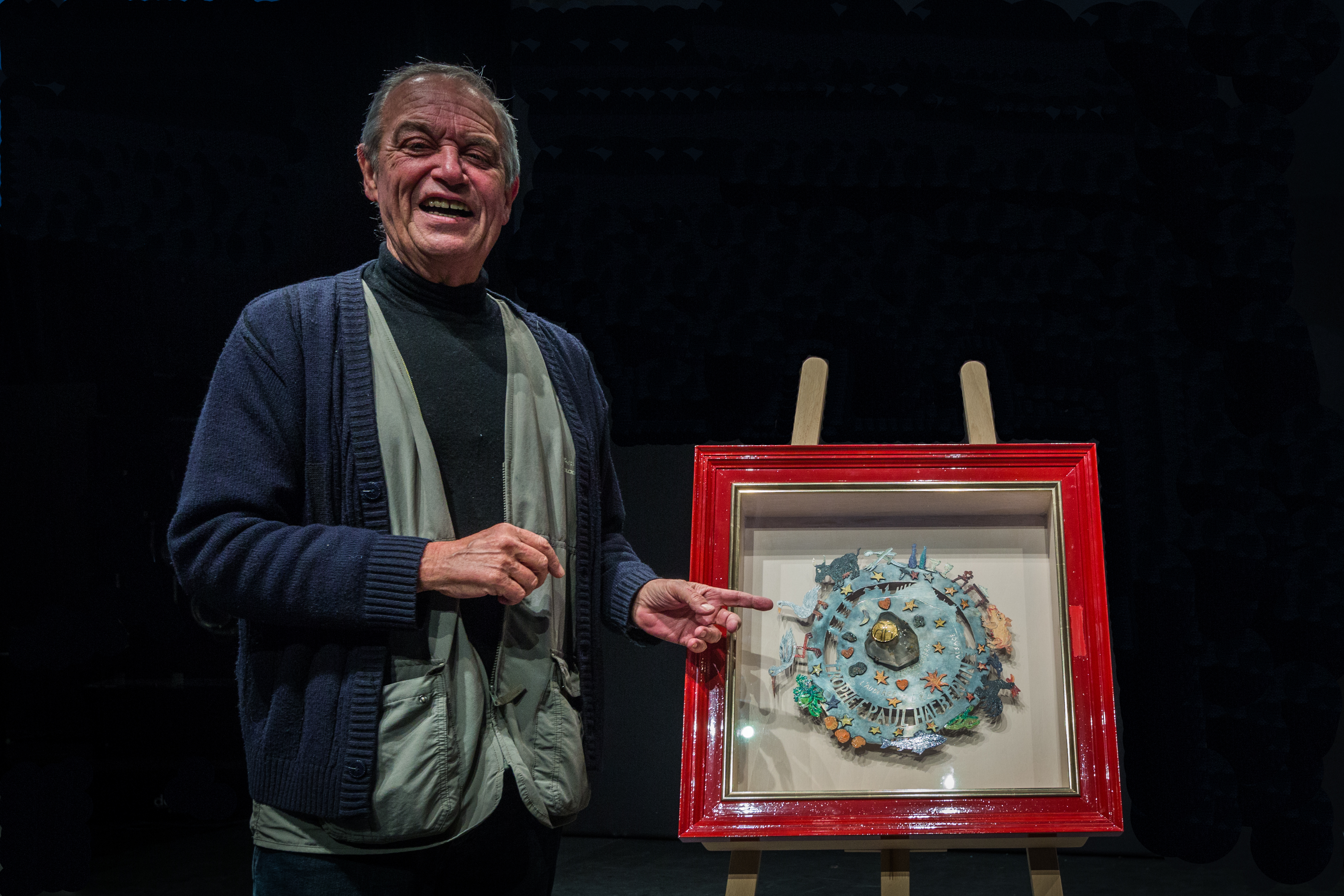 Raymond-Émile Waydelich présente le Trophée Marc Haeberlin dont il est l’auteur 18 mars 2014